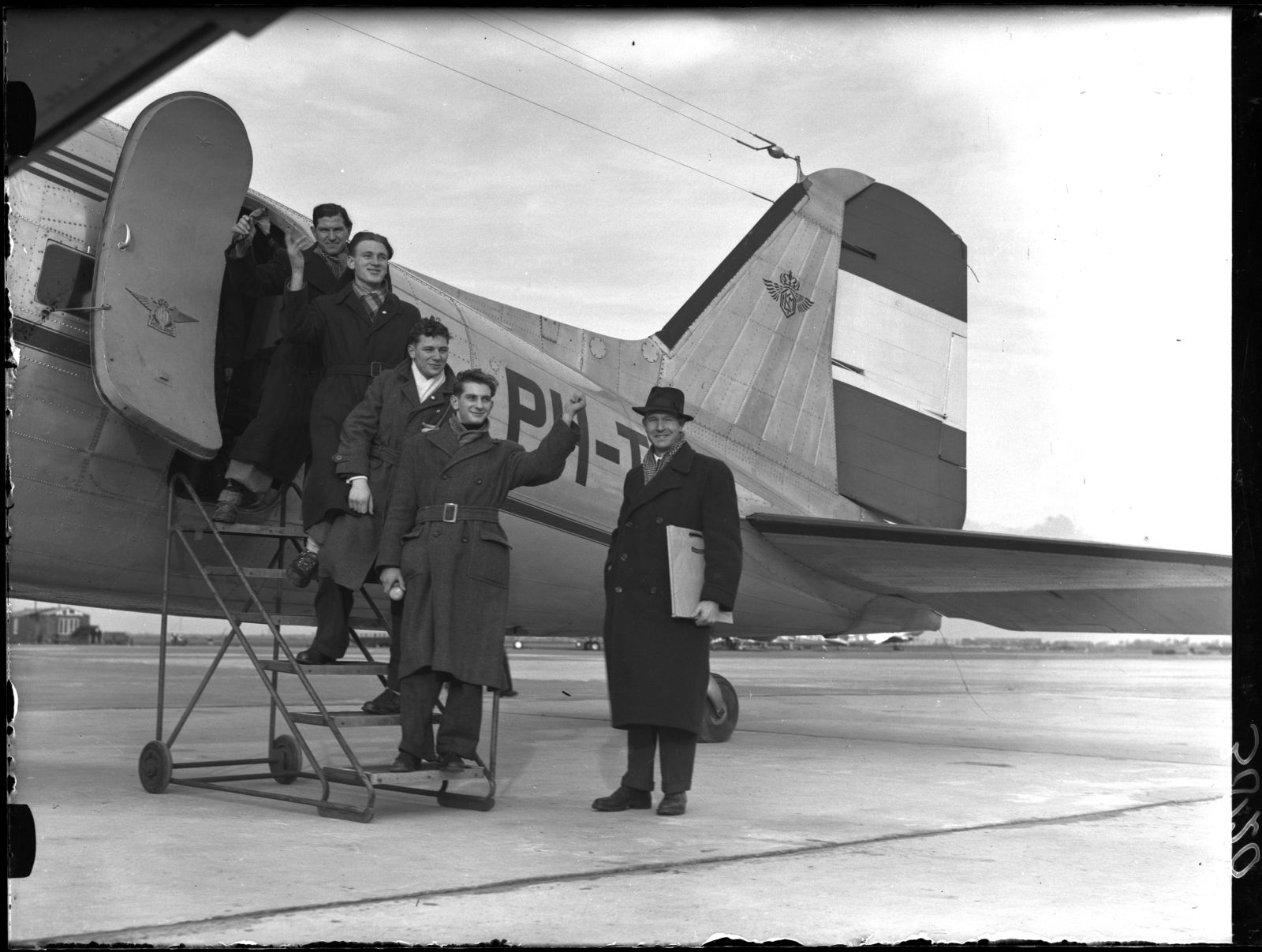 Vertrek schaatsenrijders naar Olympische Spelen in St. Moritz, Zwitserland: Langedijk (Oudkarspel), Broekman (De Lier), Huiskes (Wierden), de Koning (Purmerend) en equipeleider A.F. van der Scheer, Schiphol, 14 januari 1948. Foto Ben van Meerendonk / AHF, collectie IISG, Amsterdam Foto gepubliceerd in de Leeuwarder Courant, 15 januari 1948, voorpagina en de Heerenveense koerier, 16 januari 1948, voorpagina